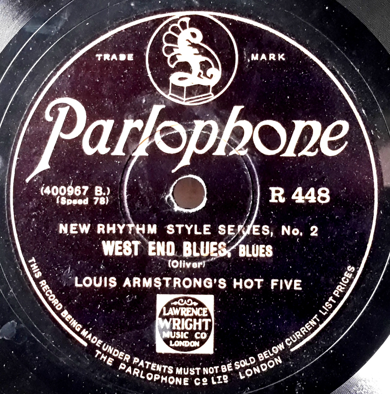 Label der englischen Marke Parlophone, zeitgenössische Lizenzpressung eines der berühmtesten Titel von Louis Armstrong